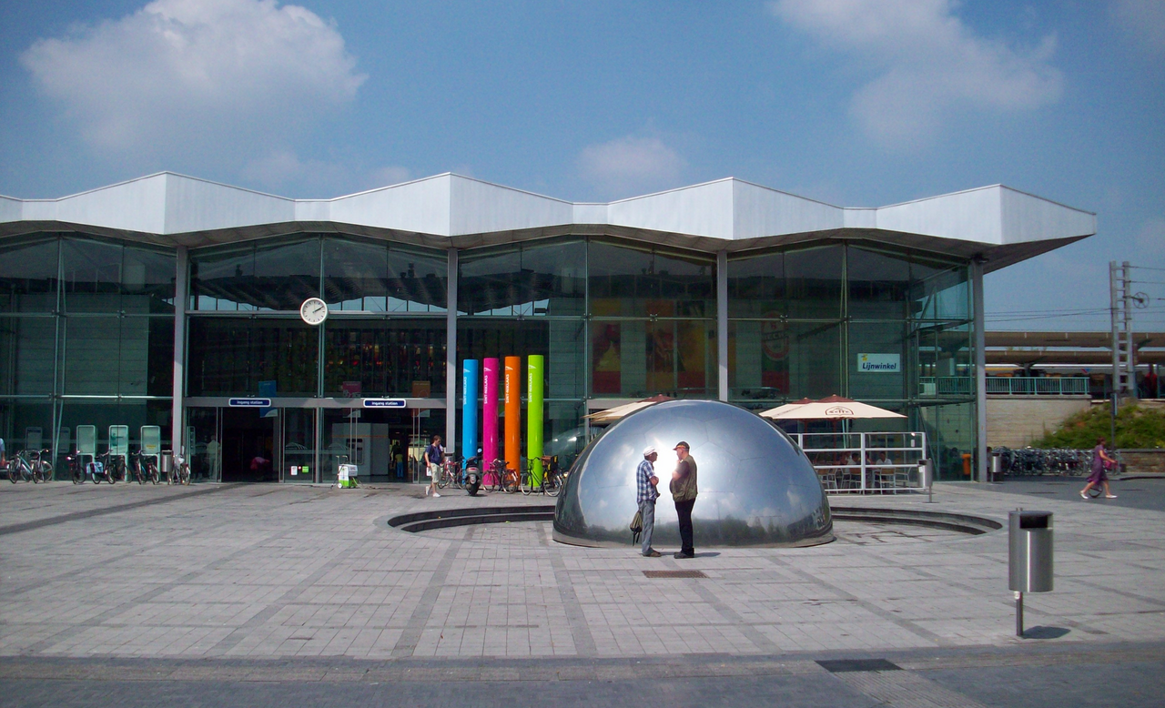 Station Sint-Niklaas